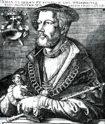 Jan van Leiden public domain Bildnis von Heinrich Aldegrever, entstanden 1536 kurz vor der Hinrichtung Jans van Leiden in Gefangenschaft. Gemalte Attribute: Fingerringe, Ketten, Zepter, Alphabetrolle, Buch. Am unteren Bildrand Jans Leitspruch ,,Gottes Macht ist meine Kraft".